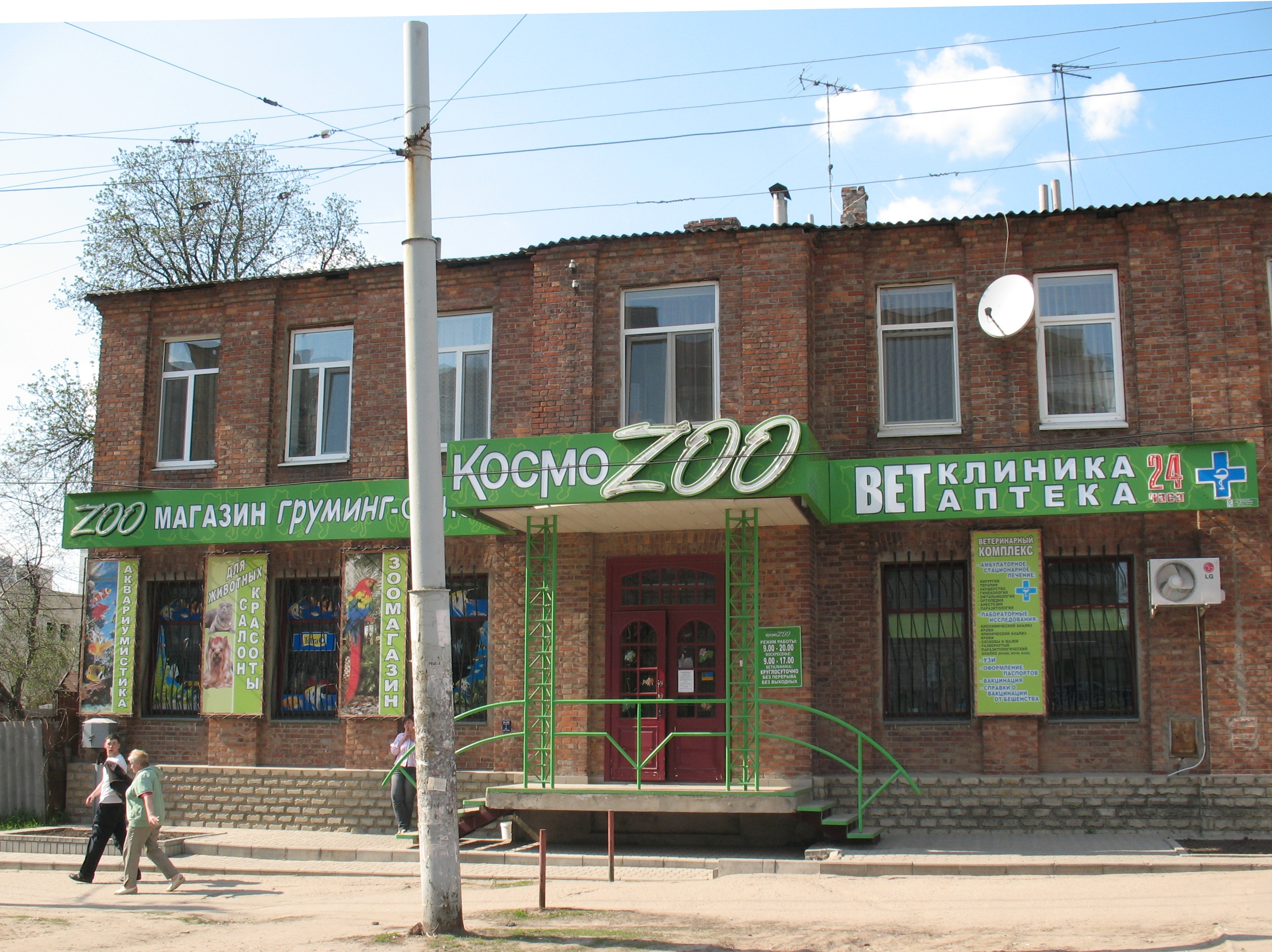 "KosmoZoo" Veterinary klinika in Kharkov City. Poltavsky Schlyah.